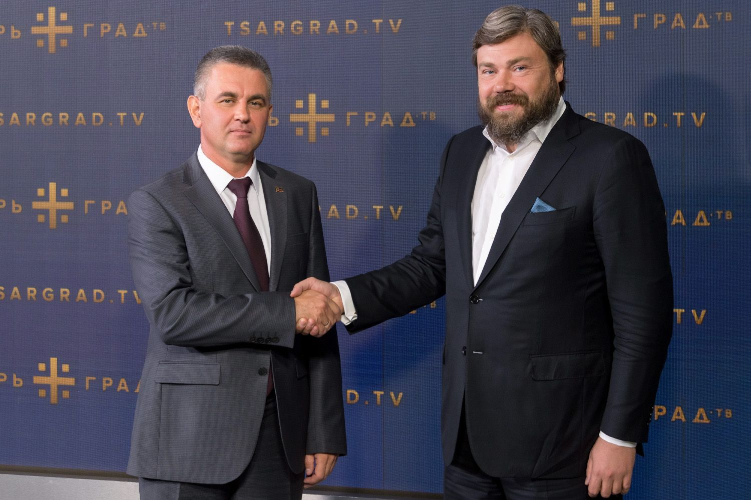 Президент Приднестровья Вадим Красносельский и российский предприниматель Константин Малофеев на телеканале Царьград 12 ноября 2019 года